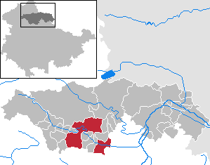 Greußen in Thuringia - Kyffhäuserkreis